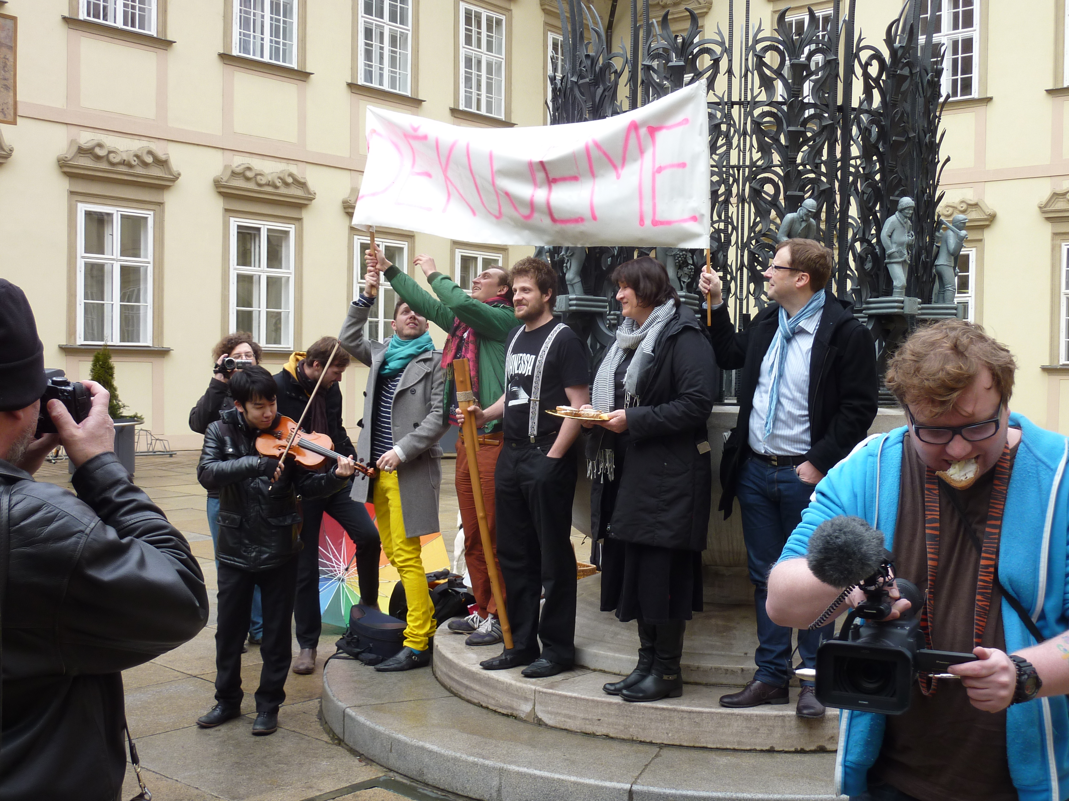 Happening iniciativy Žít Brno na nádvoří brněnské nové radnice 11.02.2014 pod názvem „11 minut ticha za Žít Brno, Romana Onderku a Vasila Biľaka“, na kterém členové iniciativy vyjádřili svůj úmysl zaregistrovat se jako politické hnutí